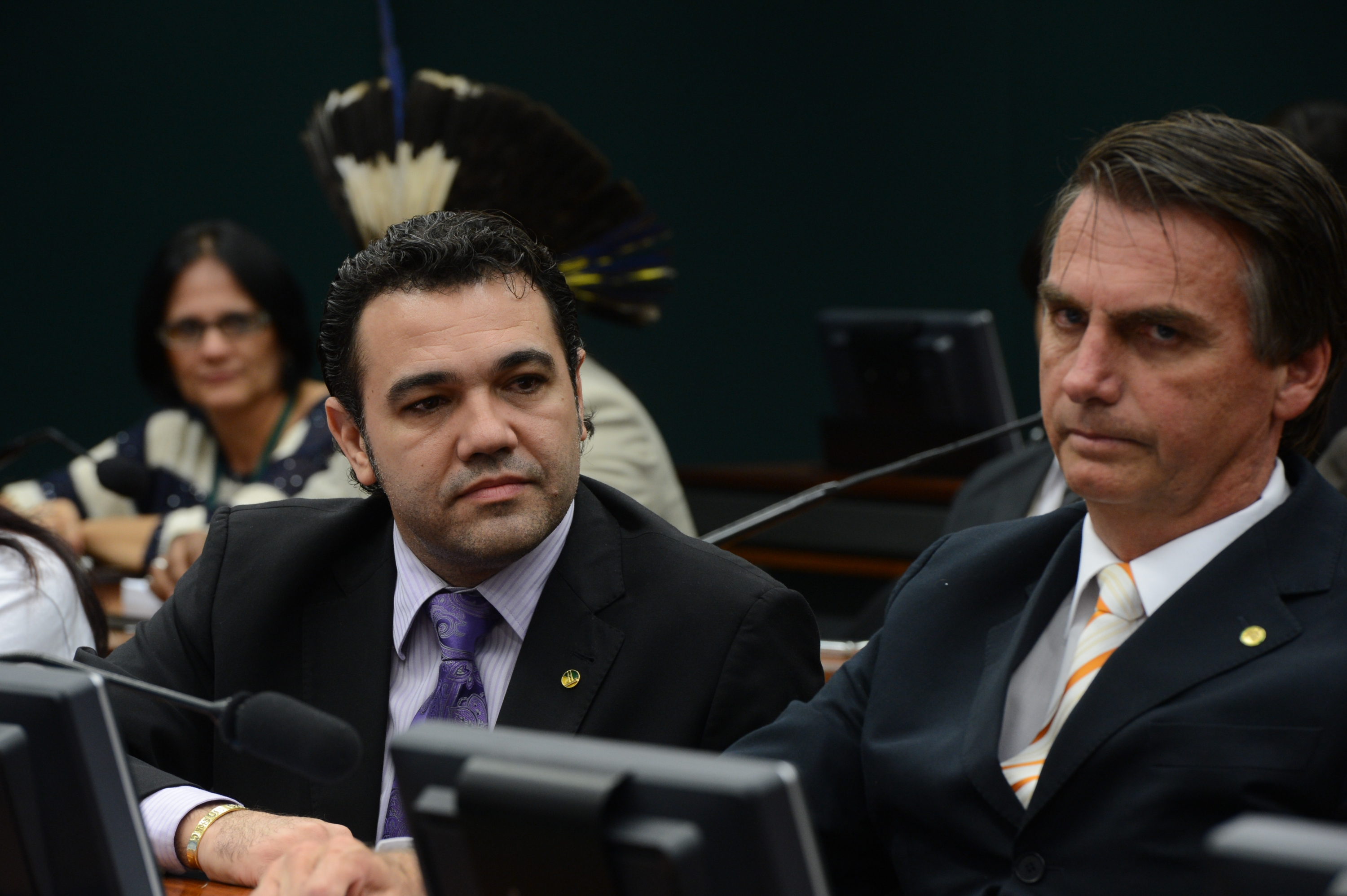 Os deputados federais brasileiros Marco Feliciano (à esquerda) e Jair Bolsonaro.